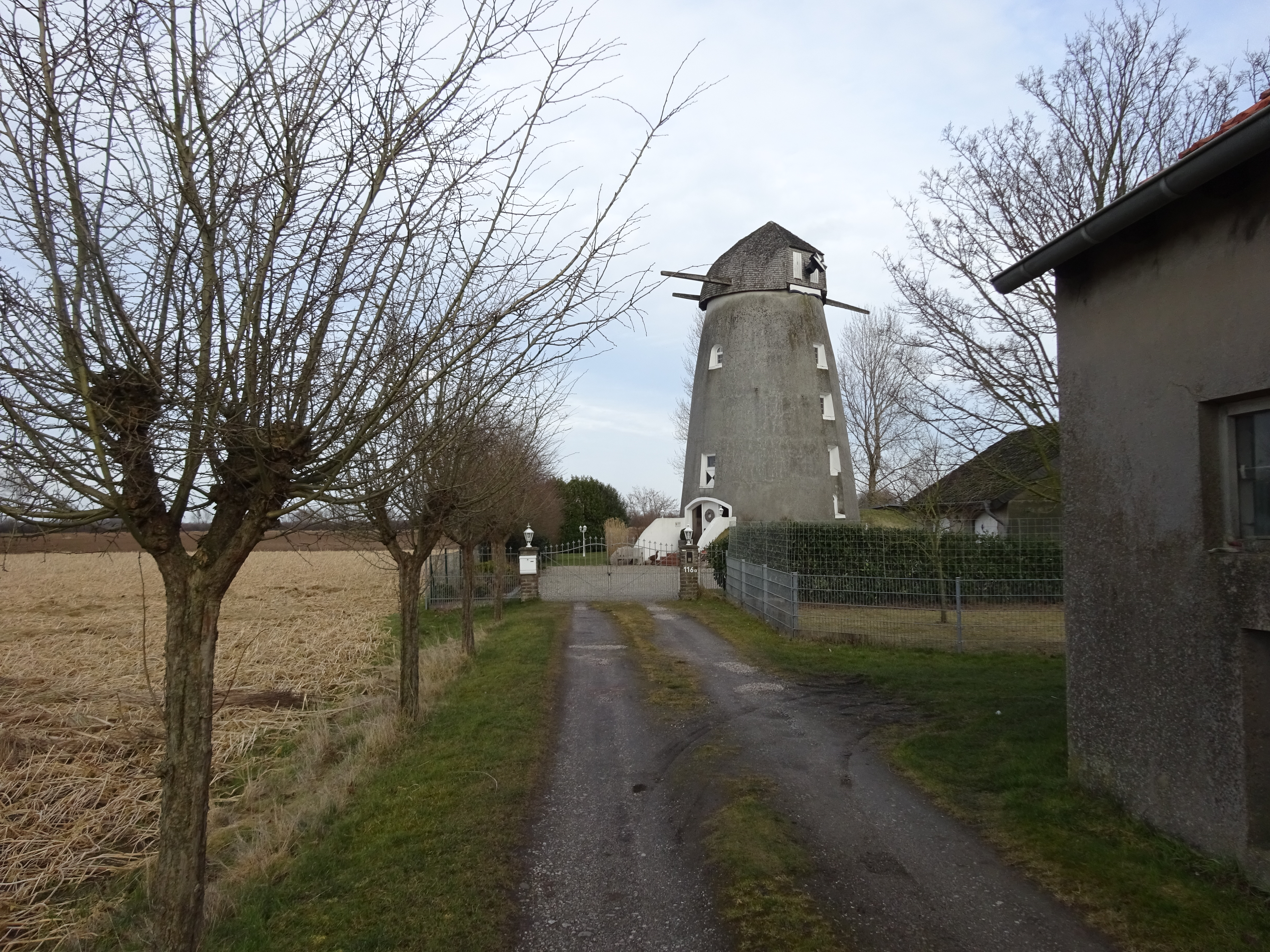 Rees-Bienen, Emmericher Landstraße 116a, Mühle Berg